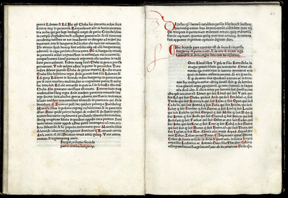 Egy lap a Chronica Hungarorum (A magyarok krónikája) című latin nyelvű krónikából. 1473. június 5-én, pünkösd előestéjén került ki Hess András budai nyomdájának első termékeként, amely egyben az első Magyarországon nyomtatott könyv volt. Jobboldalon középen a latin szöveg: "Orro Eleud filius Vgeg ex filia Eunodbilia in Scytia genuit filium, qui nominatur Almus ab eventu, quia mater eius in sompno innotuerat avis quasi in forma austuris veniens, dum esset gravida, et quod de utero eius egrederentur torrens ac in terra non sua multiplicaretur. ...." Magyarul: "Továbbá Előd fia Ügyek egy leánytól, Ennodbiliától Magorban nemzett egy fiút, akit Álmosnak neveztek amiatt az esemény miatt, hogy anyjának álmában tudtul adta egy madár - olyan ölyvféle formában jött hozzá, amikor terhes volt -, hogy méhéből egy patak fakad, de nem a saját földjén fog elsokasodni".....